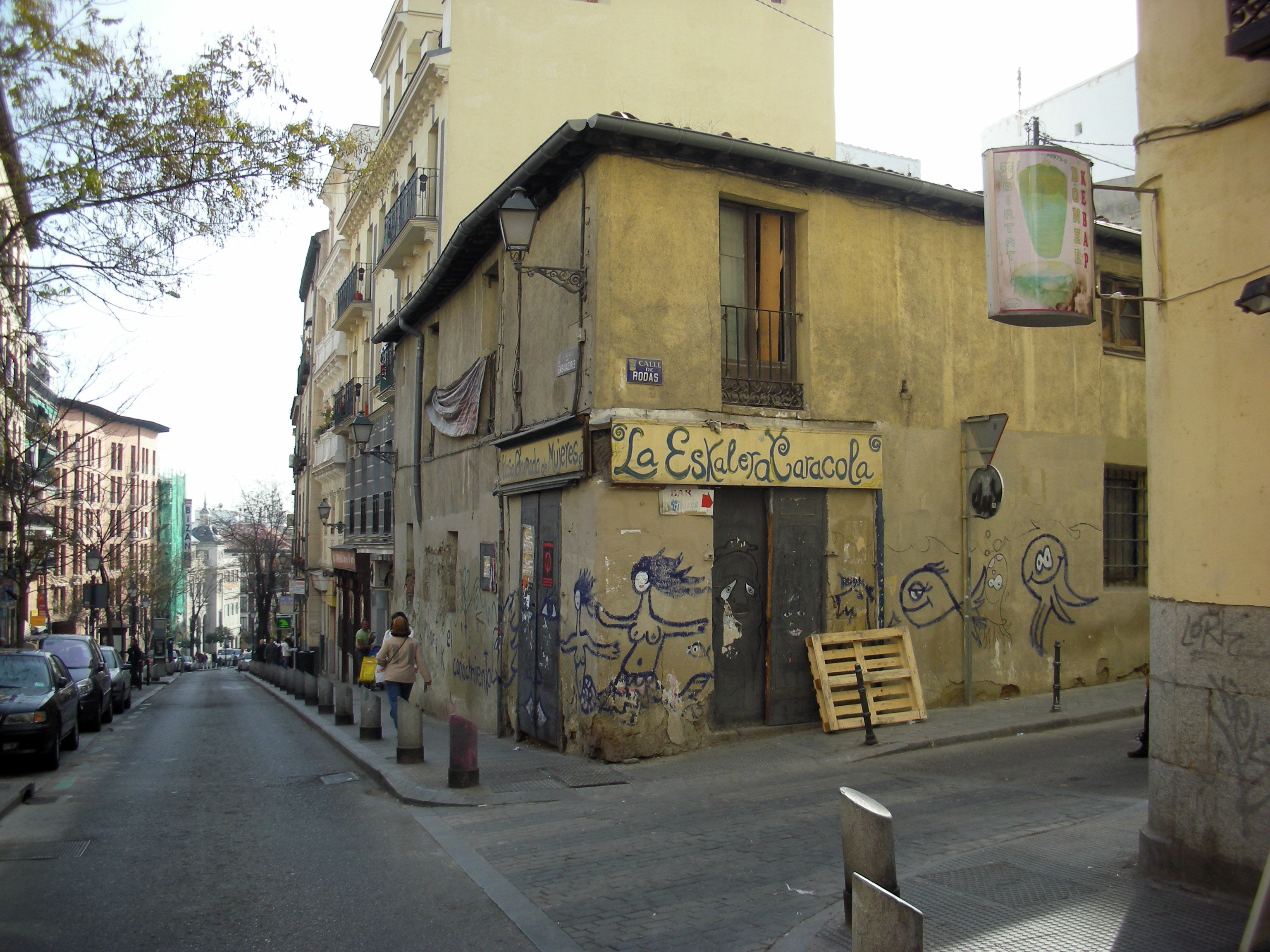 Eskalera Caracola